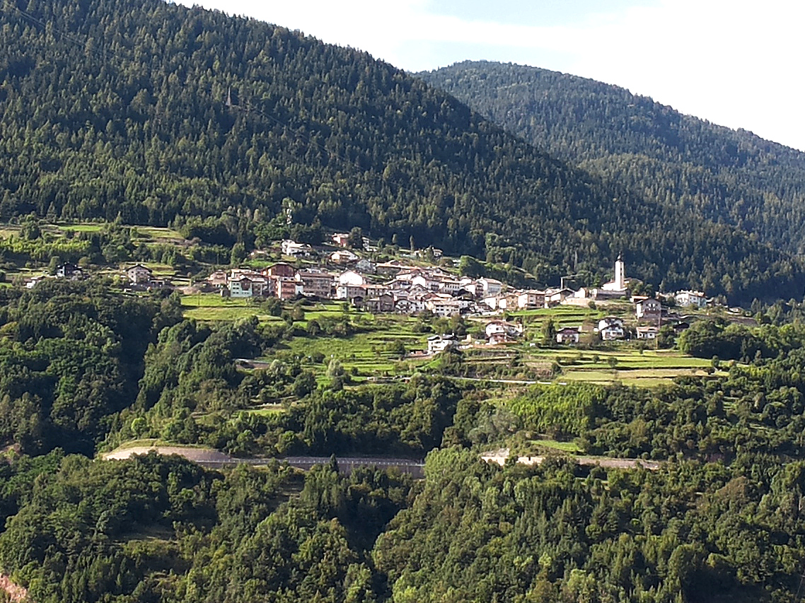 Il paese di Capriana (TN) visto da Casatta - Valfloriana (TN) (fotografia ritagliata)